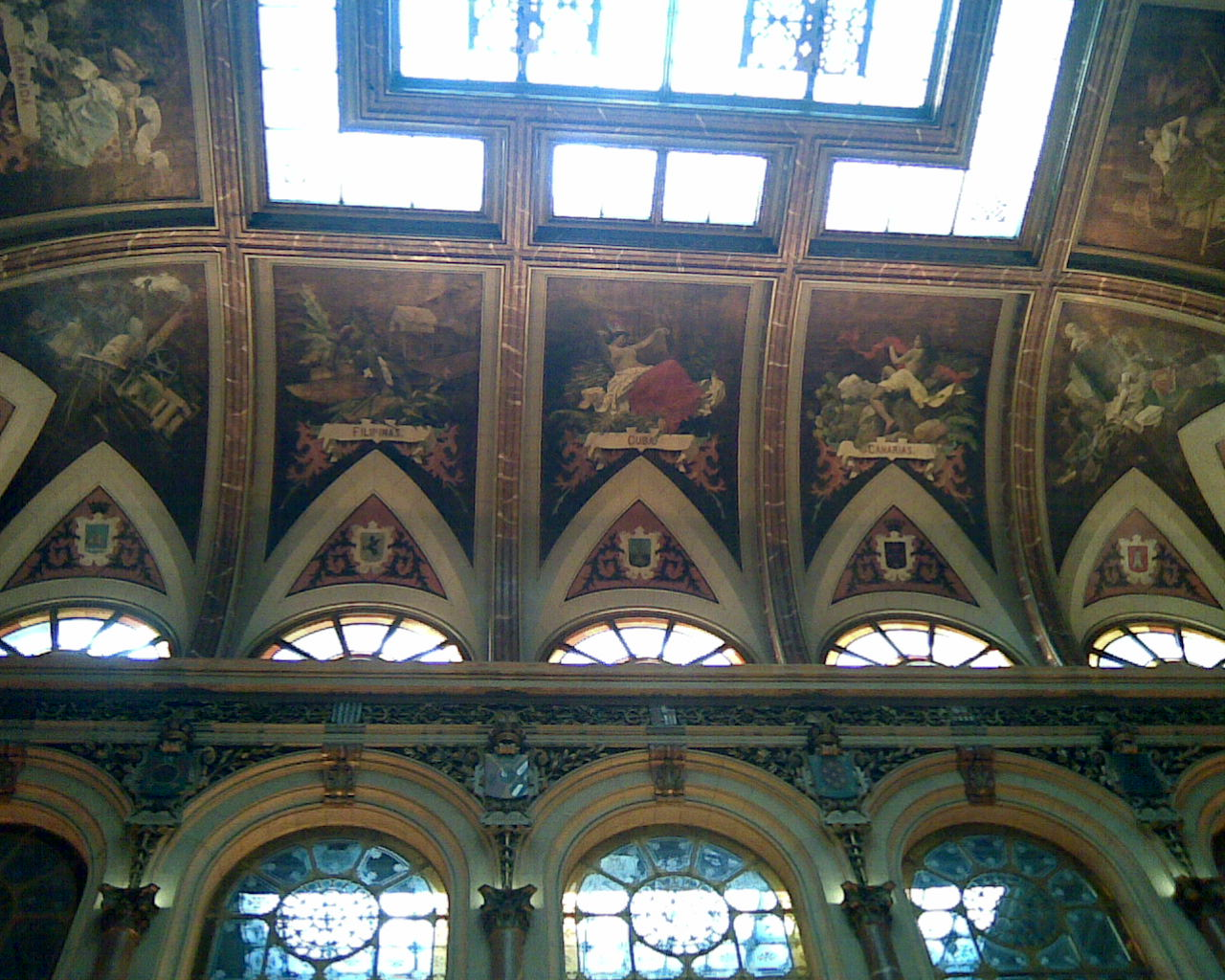 Imagen del techo que rodea la zona sur de la claraboya central del interior de la Bolsa de Madrid, en donde se puede leer Filipinas, Cuba y Canarias.